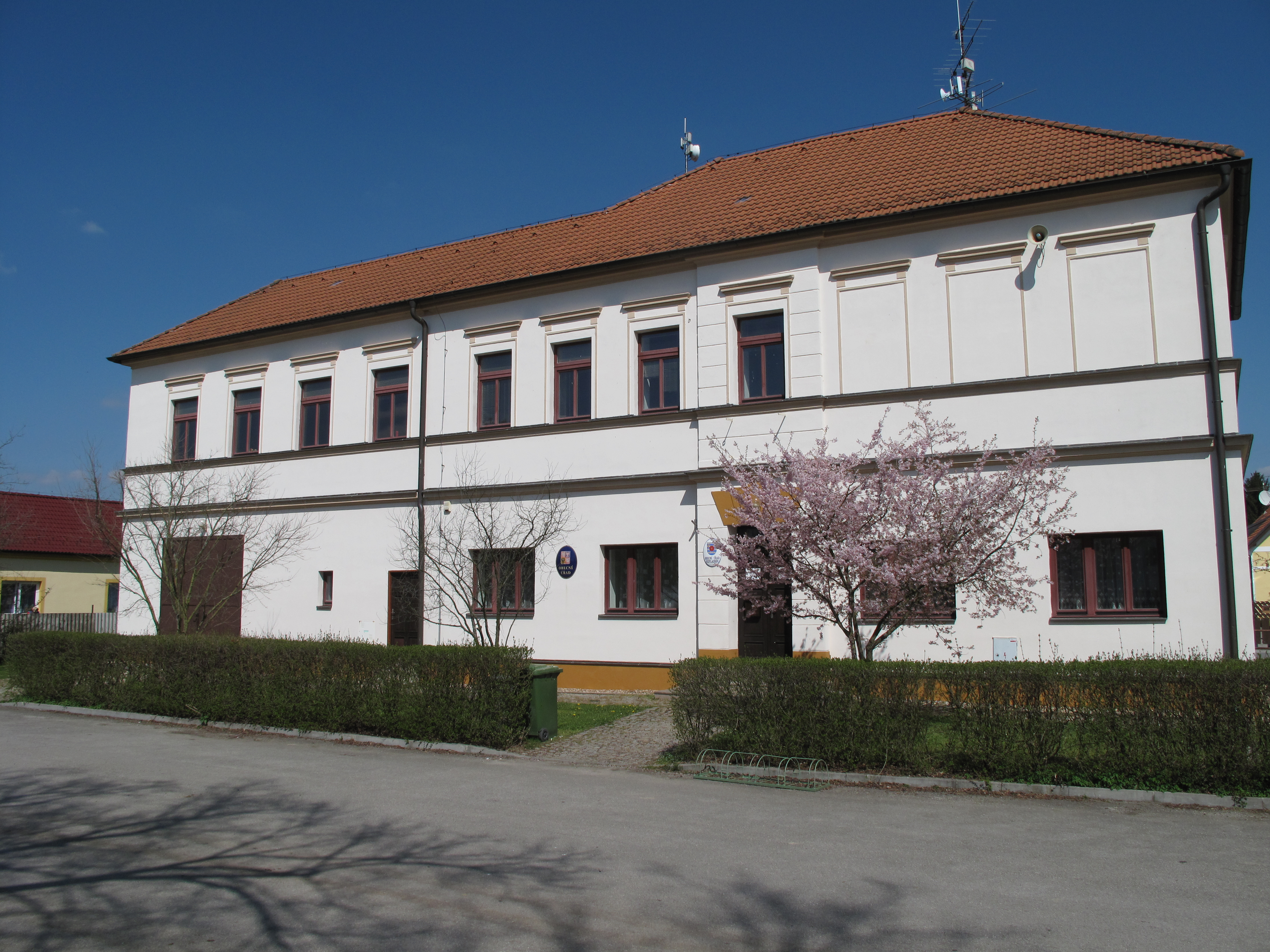 Obecní úřad v Neplachově. Okres České Budějovice, Česká republika.